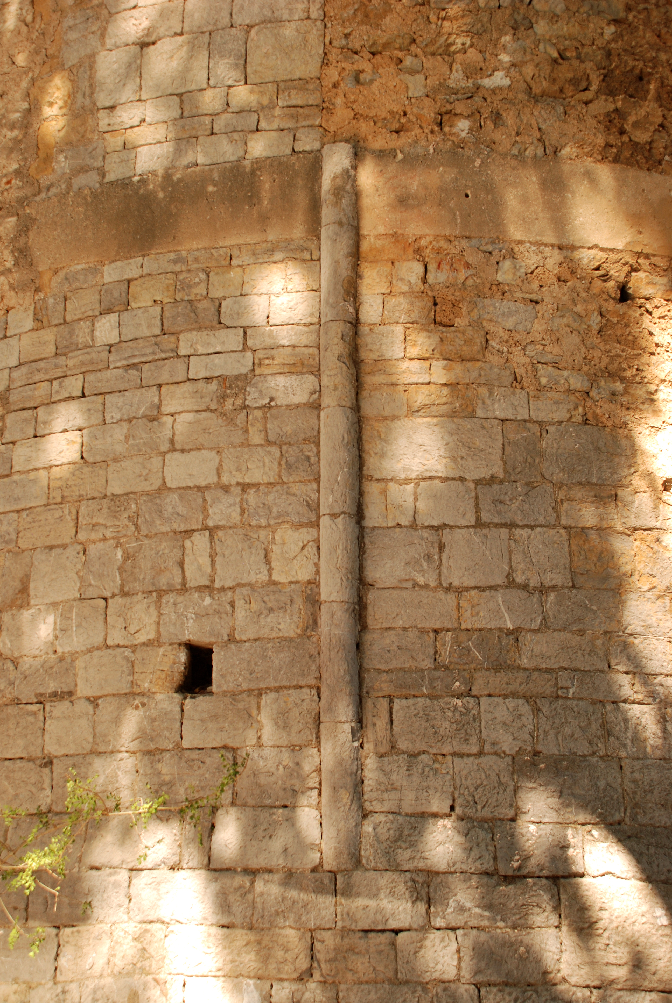 France - Hérault - Église de Saint-Jean-de-Buèges